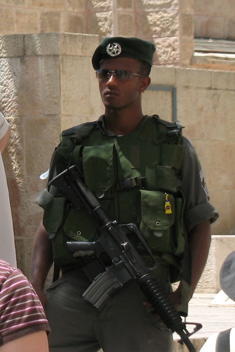 Israeli Border Guard Police_2254c